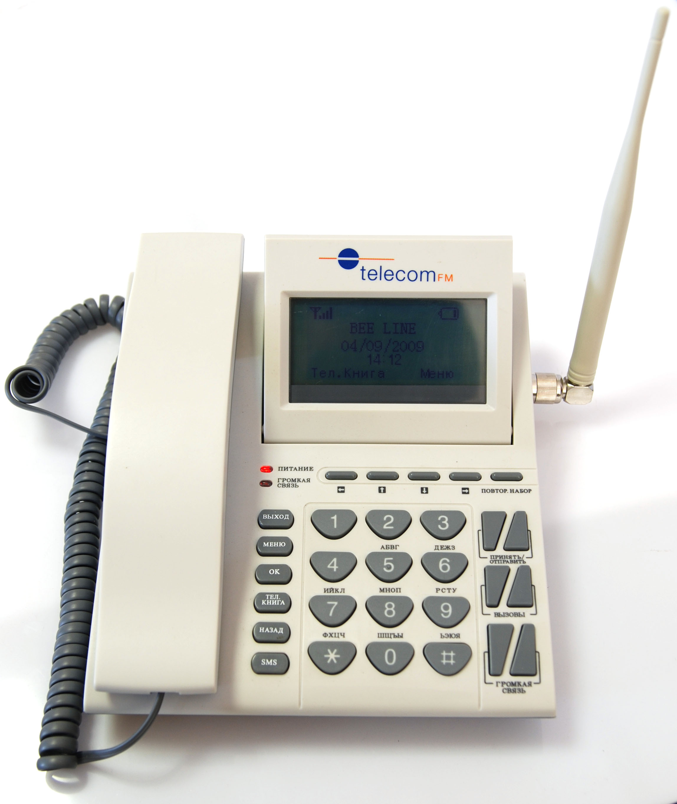 Стационарный GSM-телефон TelecomFM CellPhone